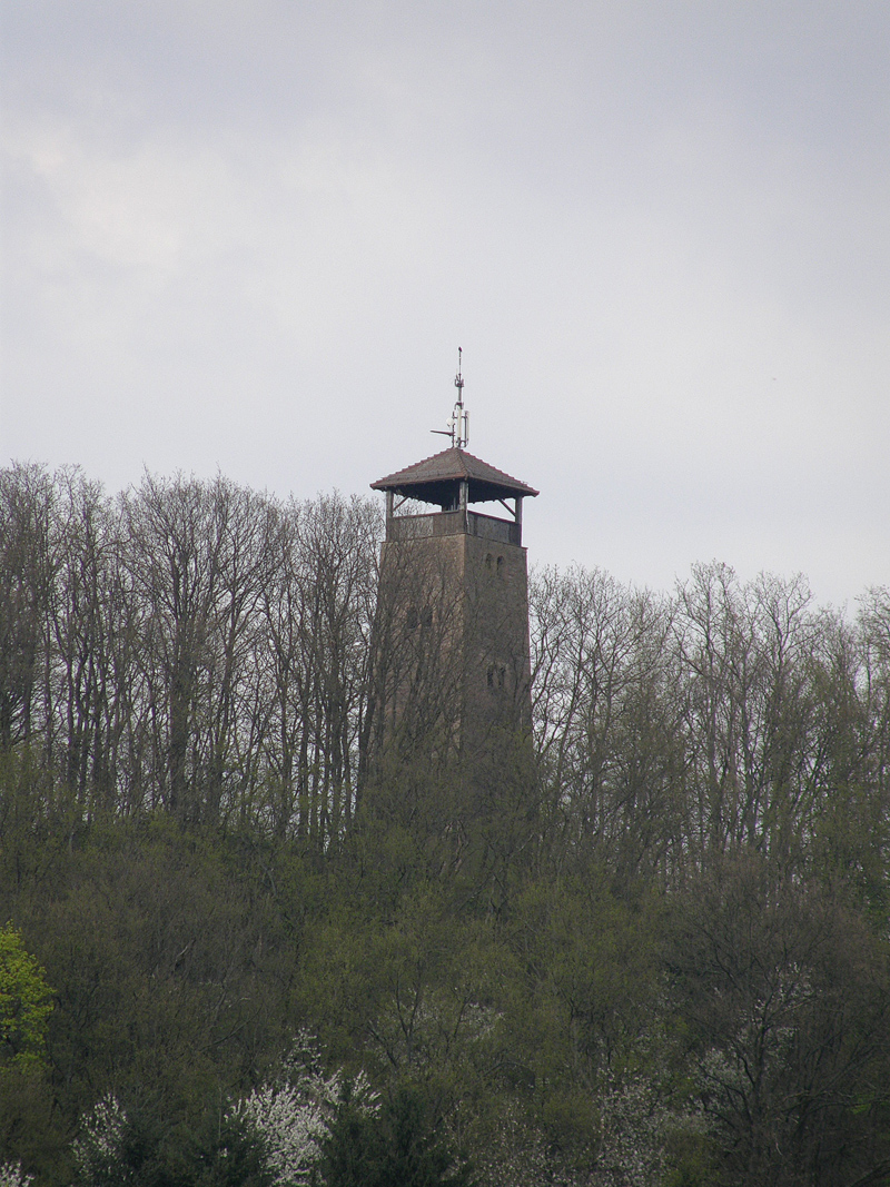 Der Ohrsbergturm bei Eberbach im Odenwald.